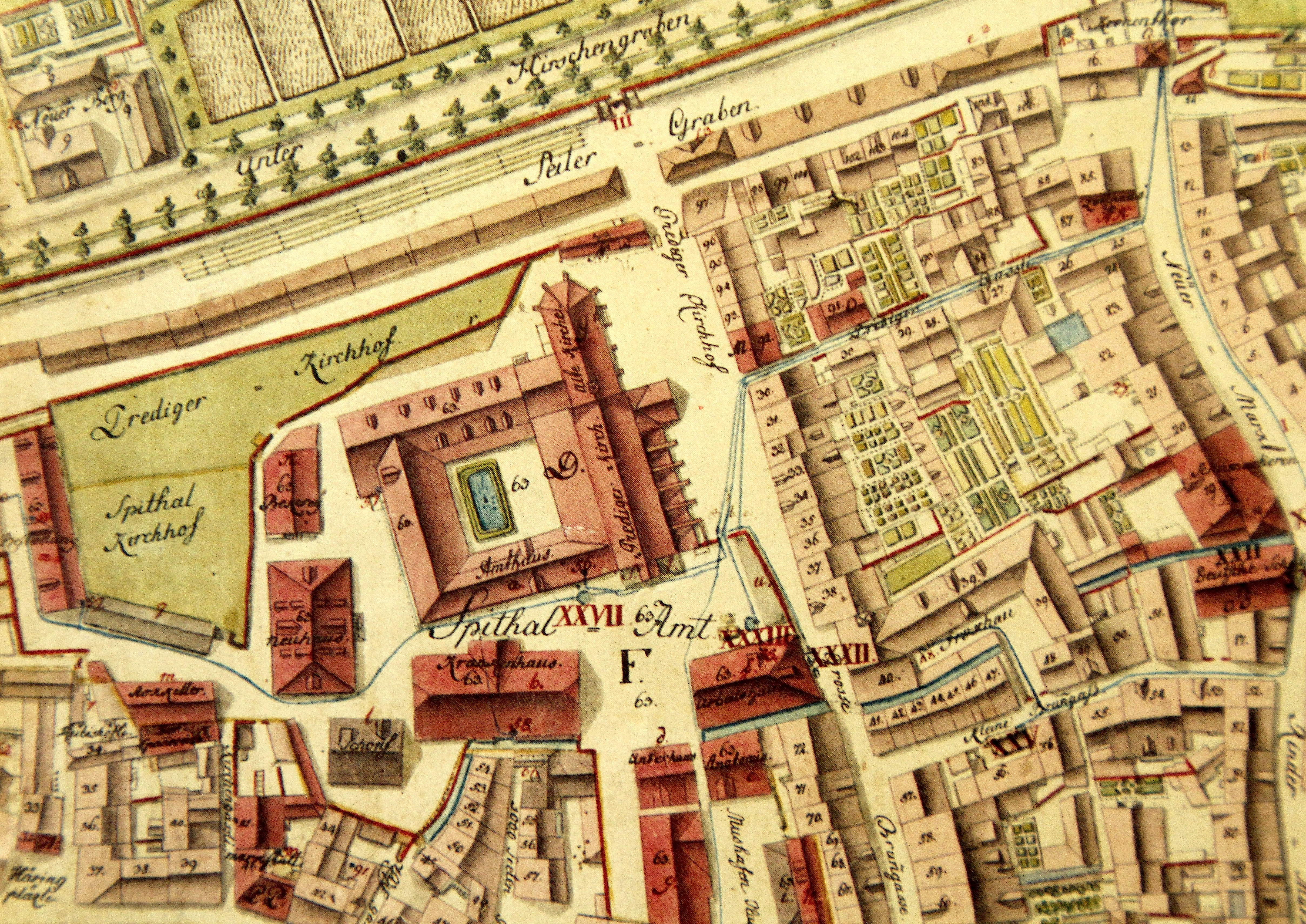 Predigerkloster Zürich auf dem Müllerplan von 1793